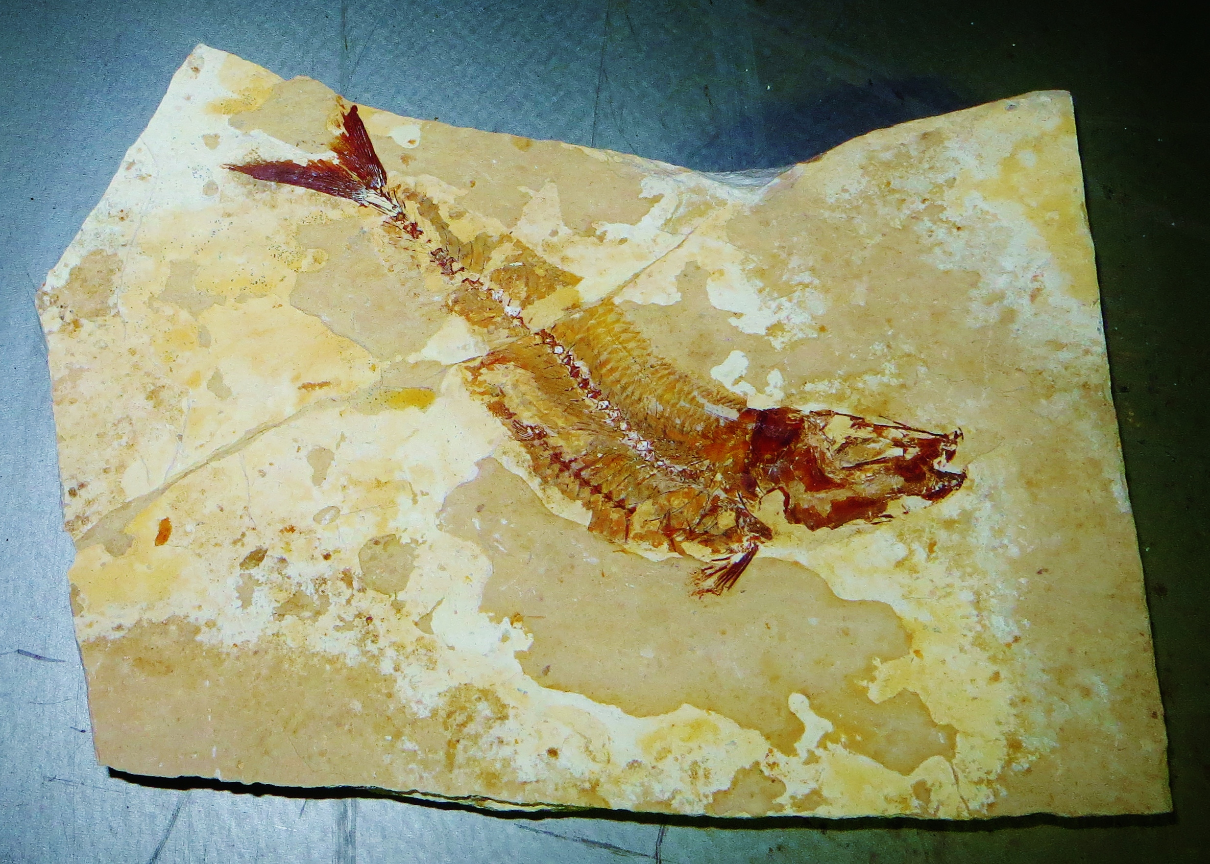 Fossil of Scombroclupea - Took the picture at Museo di Storia Naturale, Milano